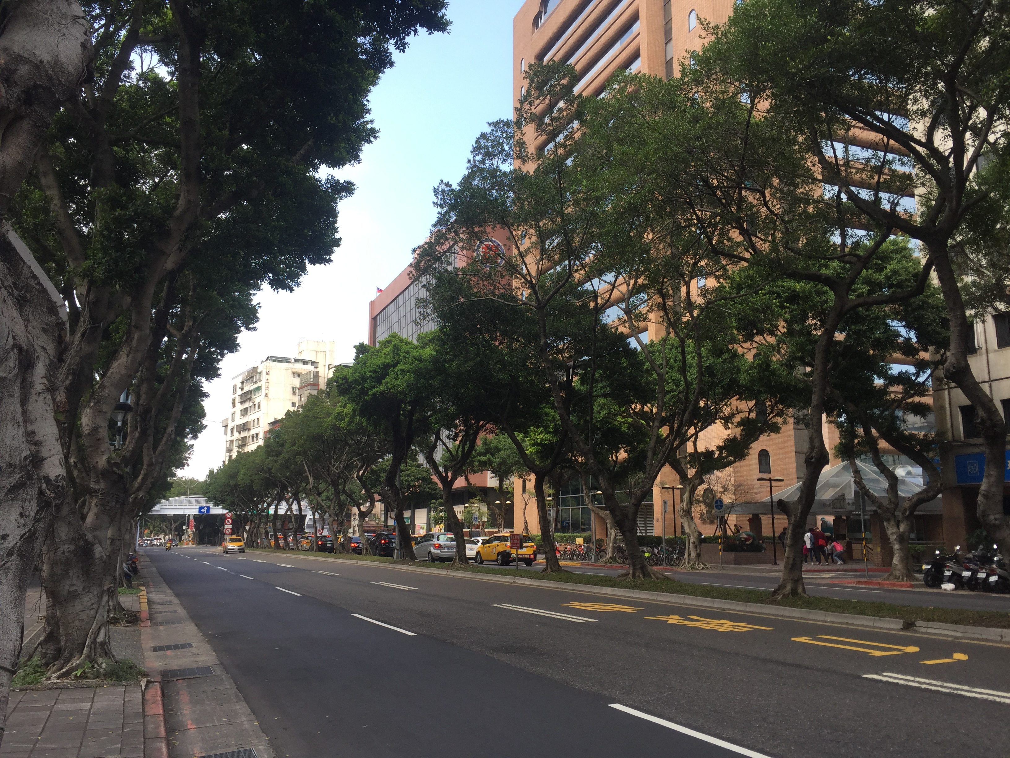 臺北市中正區重慶南路二段，郵政博物館前。